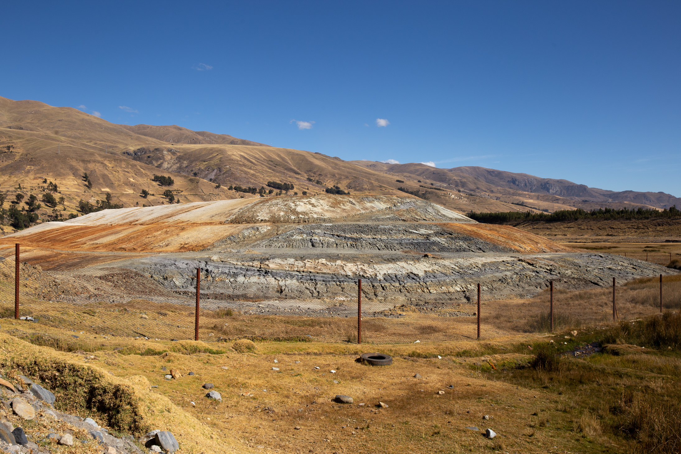 Foto tomada durante el Paseo Turístico, Educativo y Fotográfico organizado por Wiki Loves Andes el 20 de julio de 2019 para conocer parte del patrimonio minero en la provincia de Recuay, Áncash.